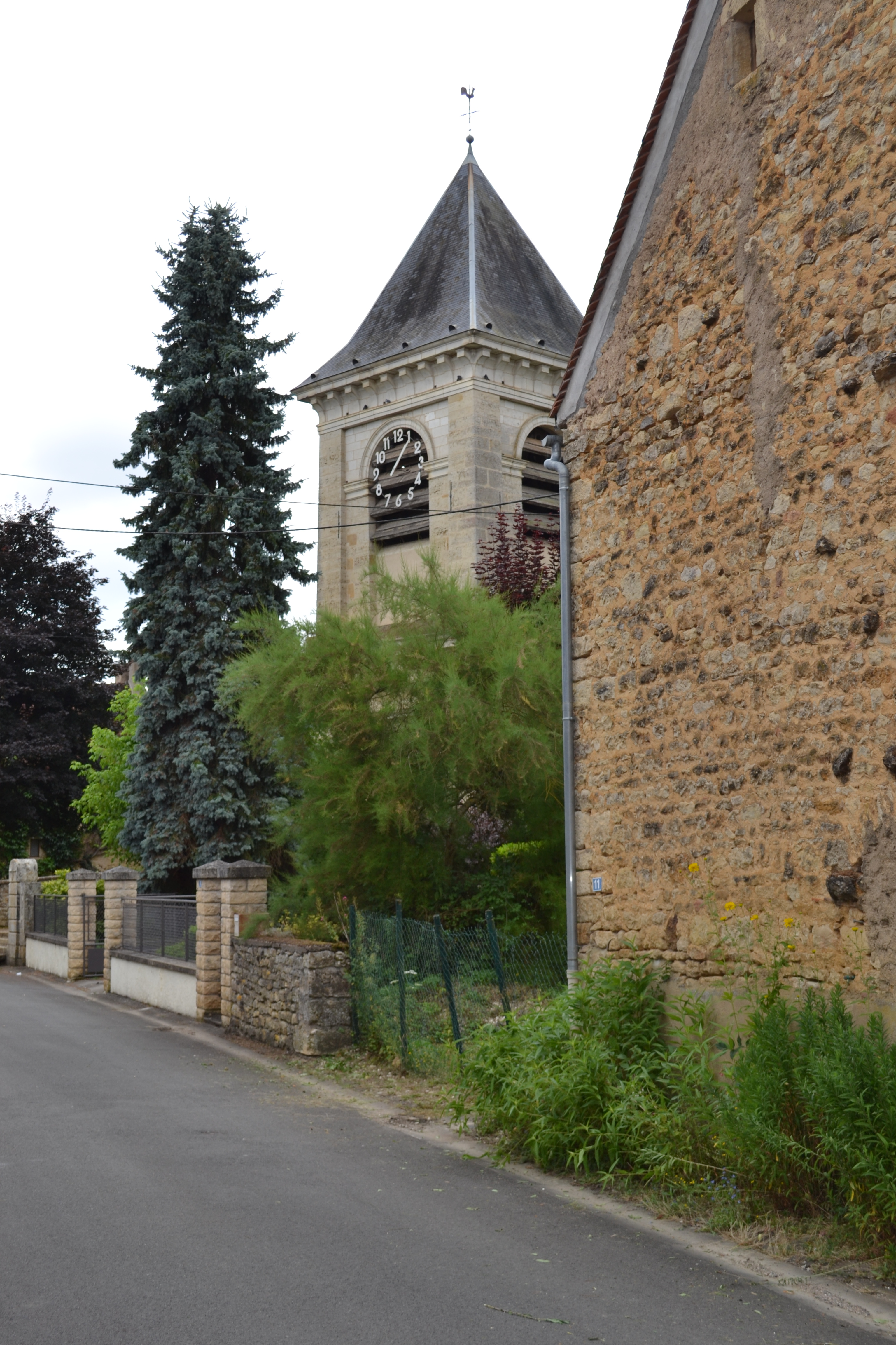 Vue de l'église de Trucy-l'Orgueilleux (Nièvre).